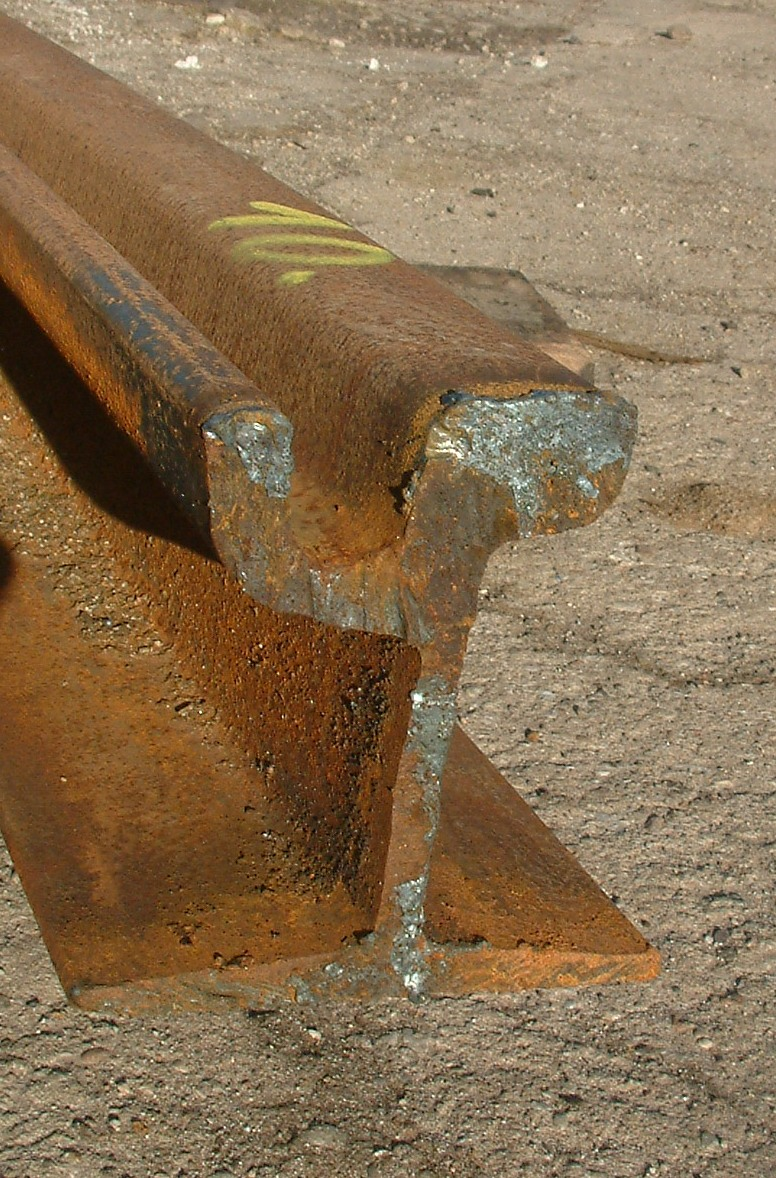 Tram track